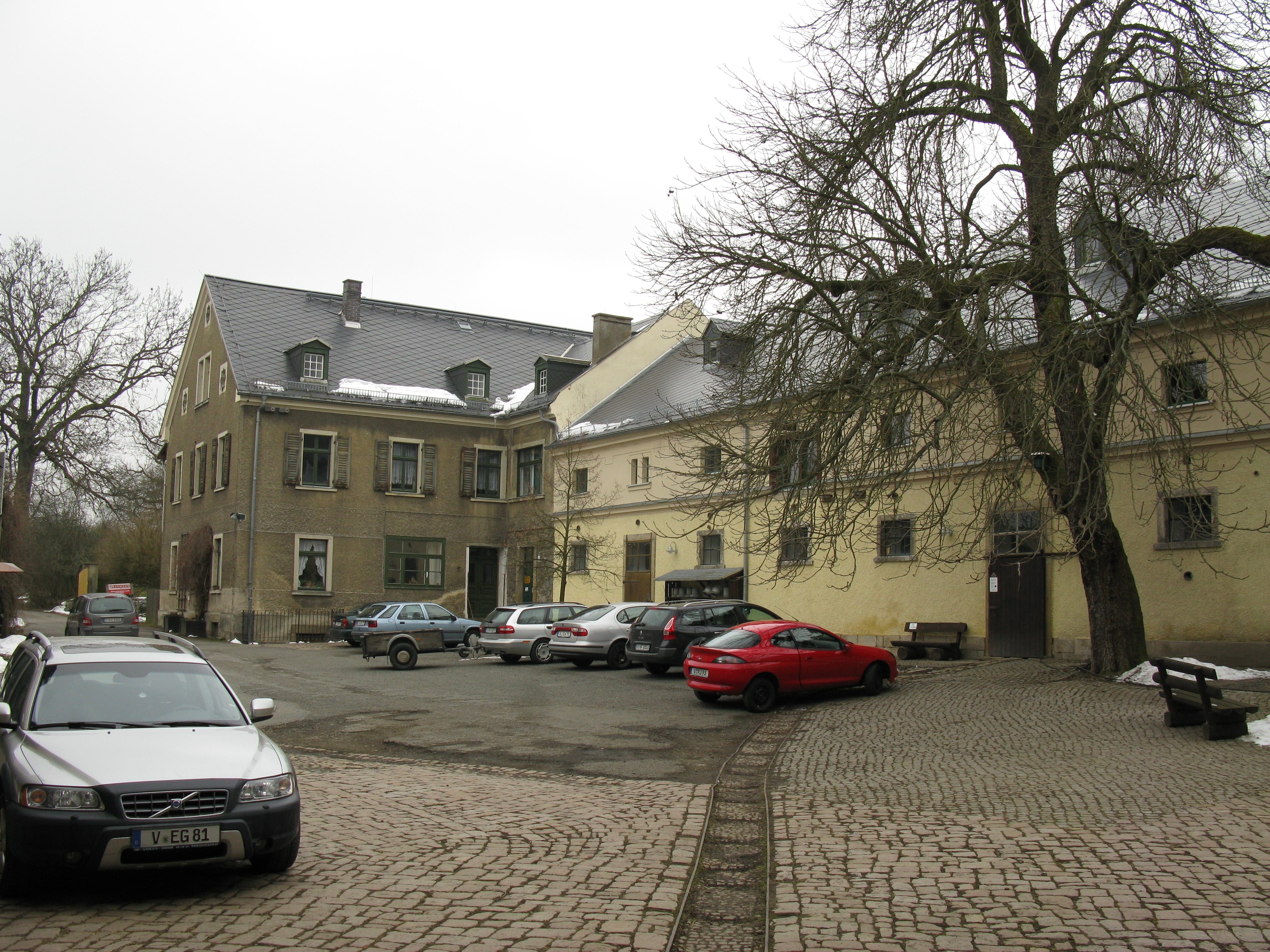 Denkmalgeschütztes Gehöft an der Pfaffengutstraße (Pfaffengutstraße 16) im Plauener, Stadtteil Pfaffengut